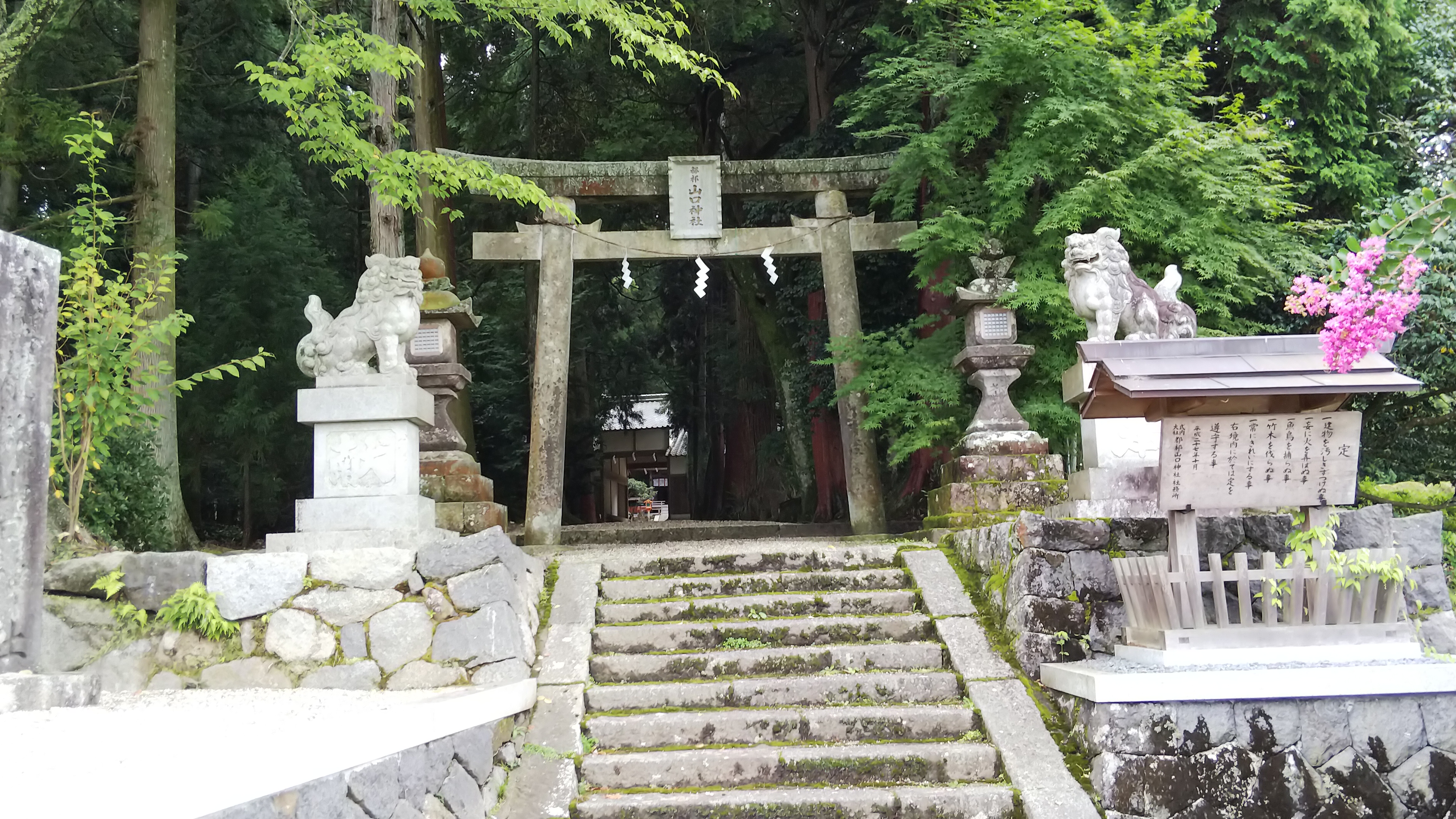 都祁山口神社鳥居